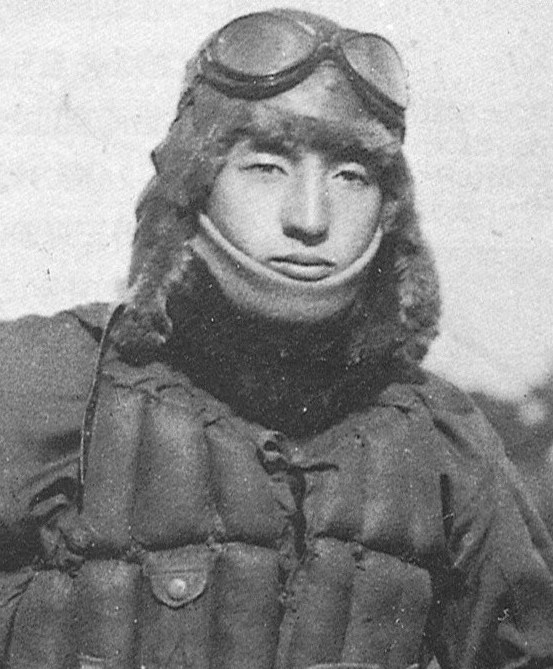 ラバウルでの柳谷謙治